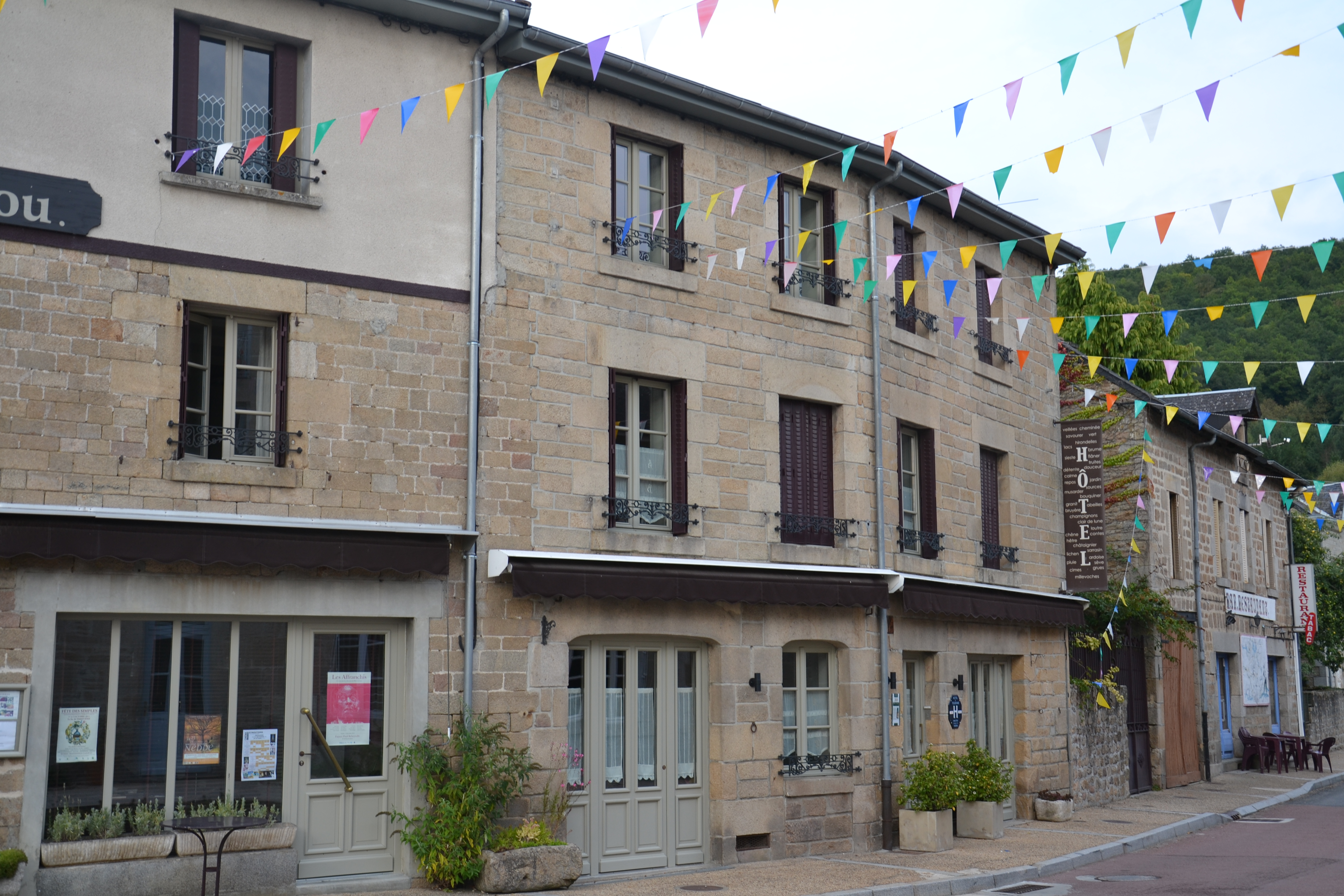 Maisons dans le centre-bourg de Nedde (Haute-Vienne, France)